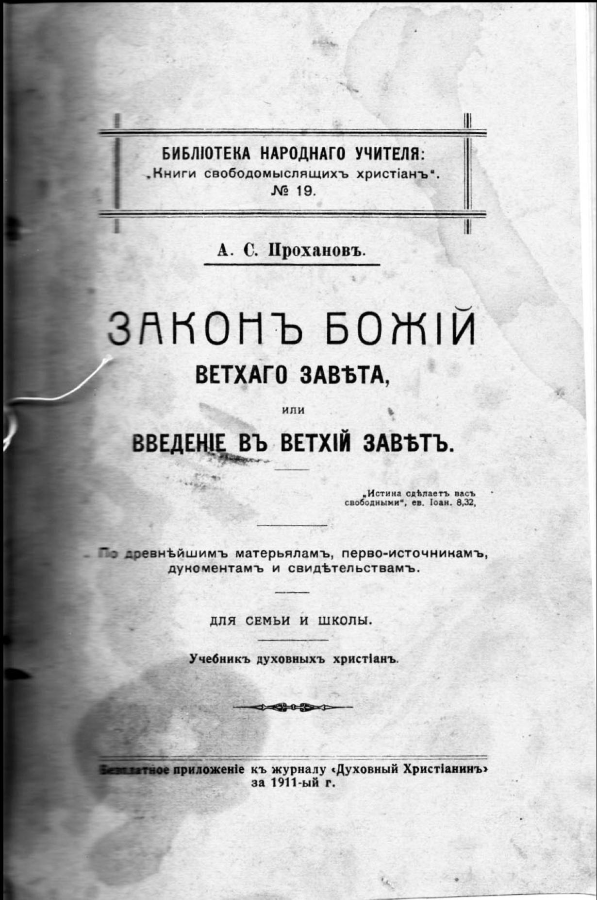 Обложка книги А. С. Проханова Закон Божий Ветхого Завета или введение в Ветхий Завет. — Чикаго: Типография И. В. Леонтьева, 1911. — («Библиотека народного учителя: книги свободомыслящих христиан»).